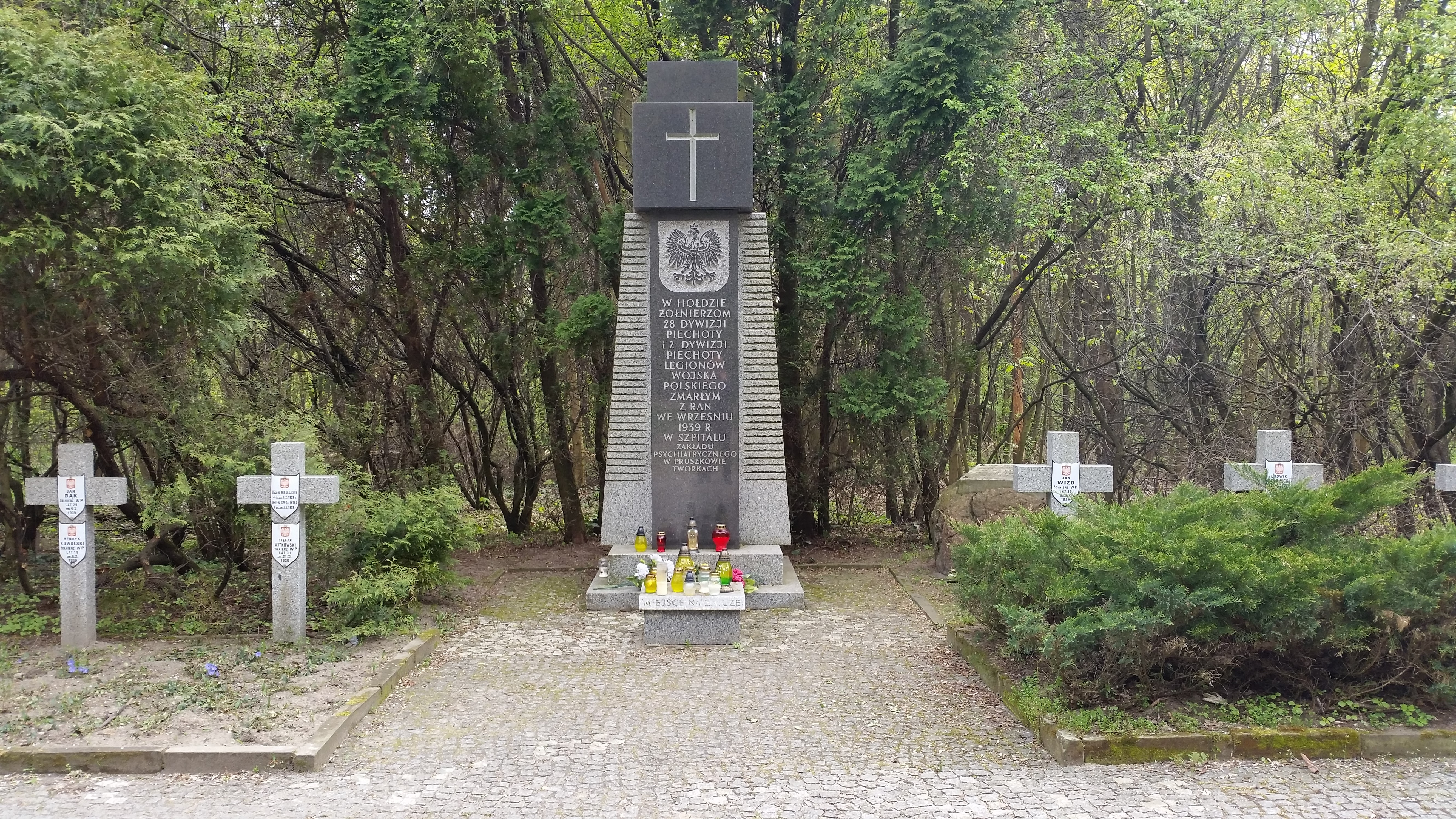 Miejsce upamiętnienia żołnierzy 28 Dywizji Piechoty i 2 Dywizji Piechoty Legionów Wojska Polskiego zmarłym z ran we wrześniu 1939 roku w szpitalu zakładu psychiatrycznego w Pruszkowie Tworkach